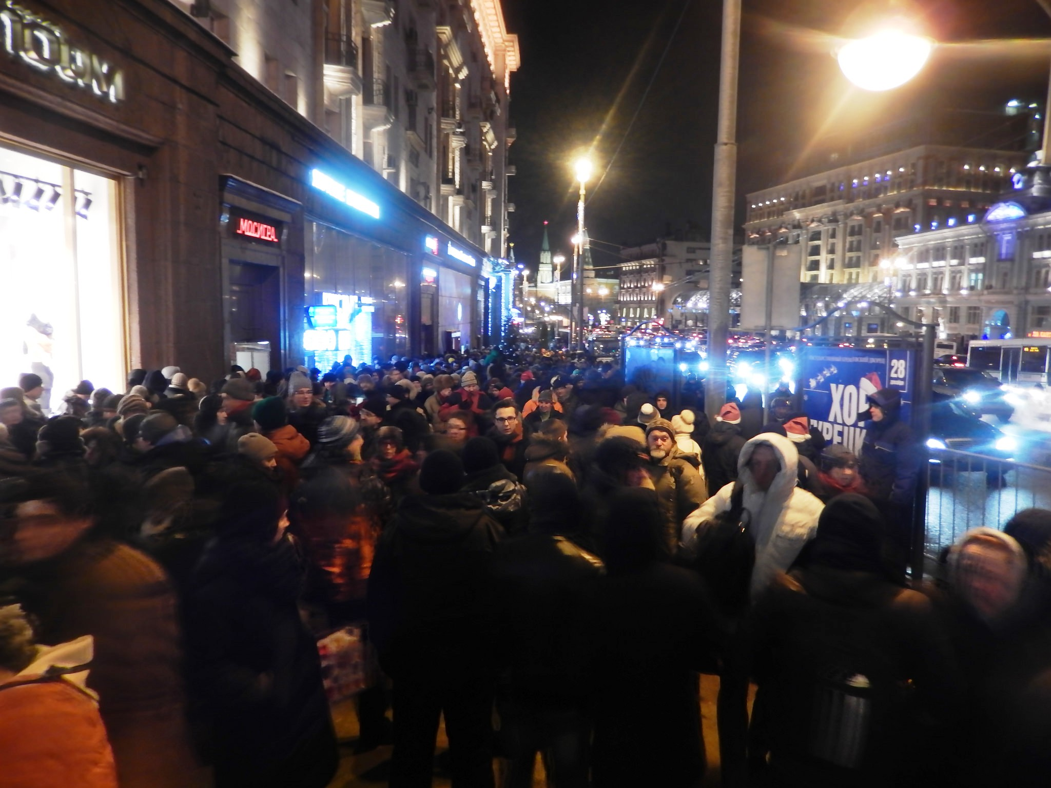 Встреча на Манежной. 30.12.2014